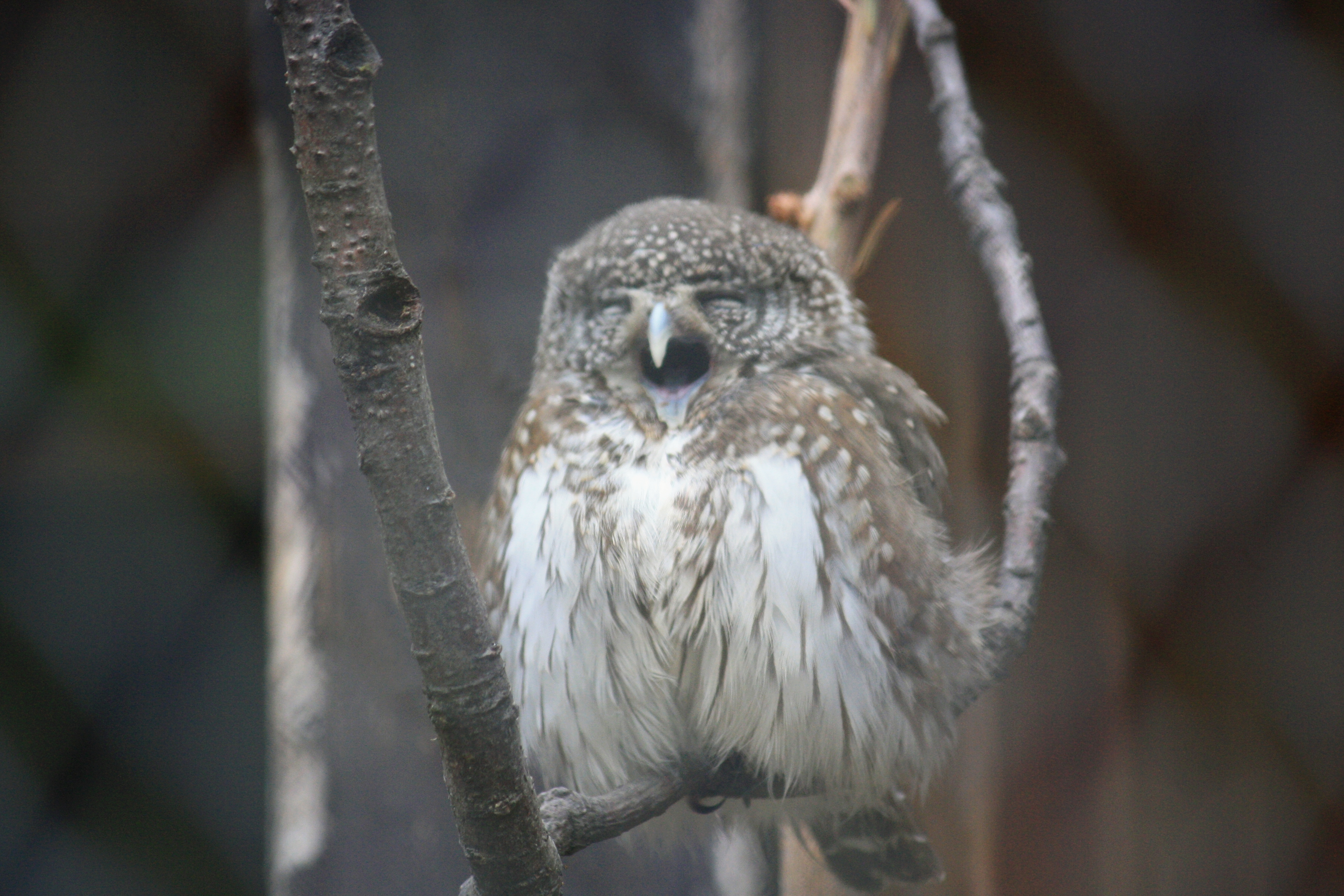 Zoo Praha